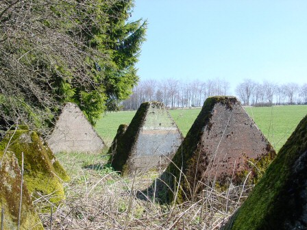 Toestemming van Scorpio